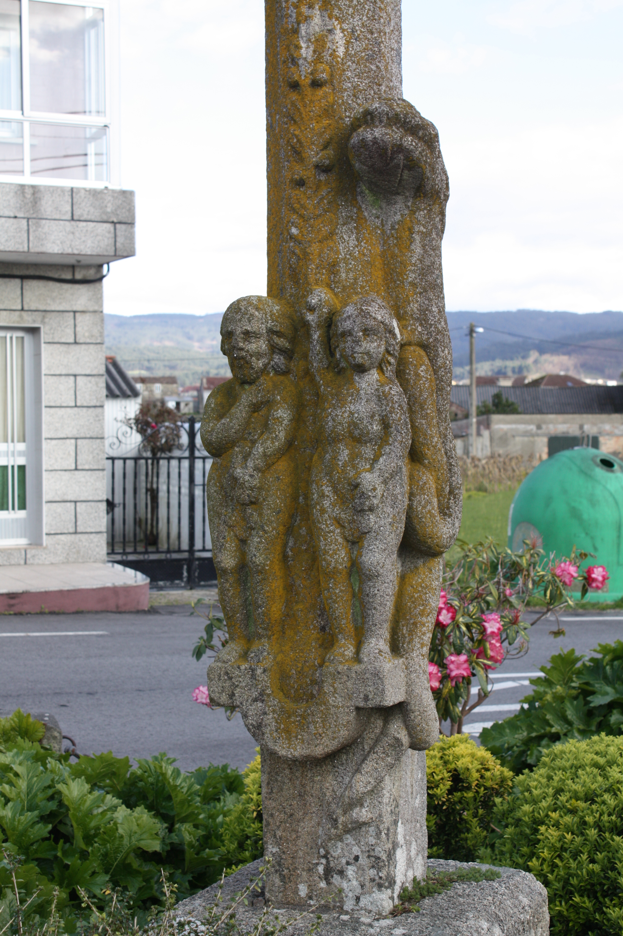 Figuras de Adán y Eva no fuste dun cruceiro do lugar de Covas de Lobos, na parroquia de San Adrián de Vilariño (Cambados, Pontevedra)